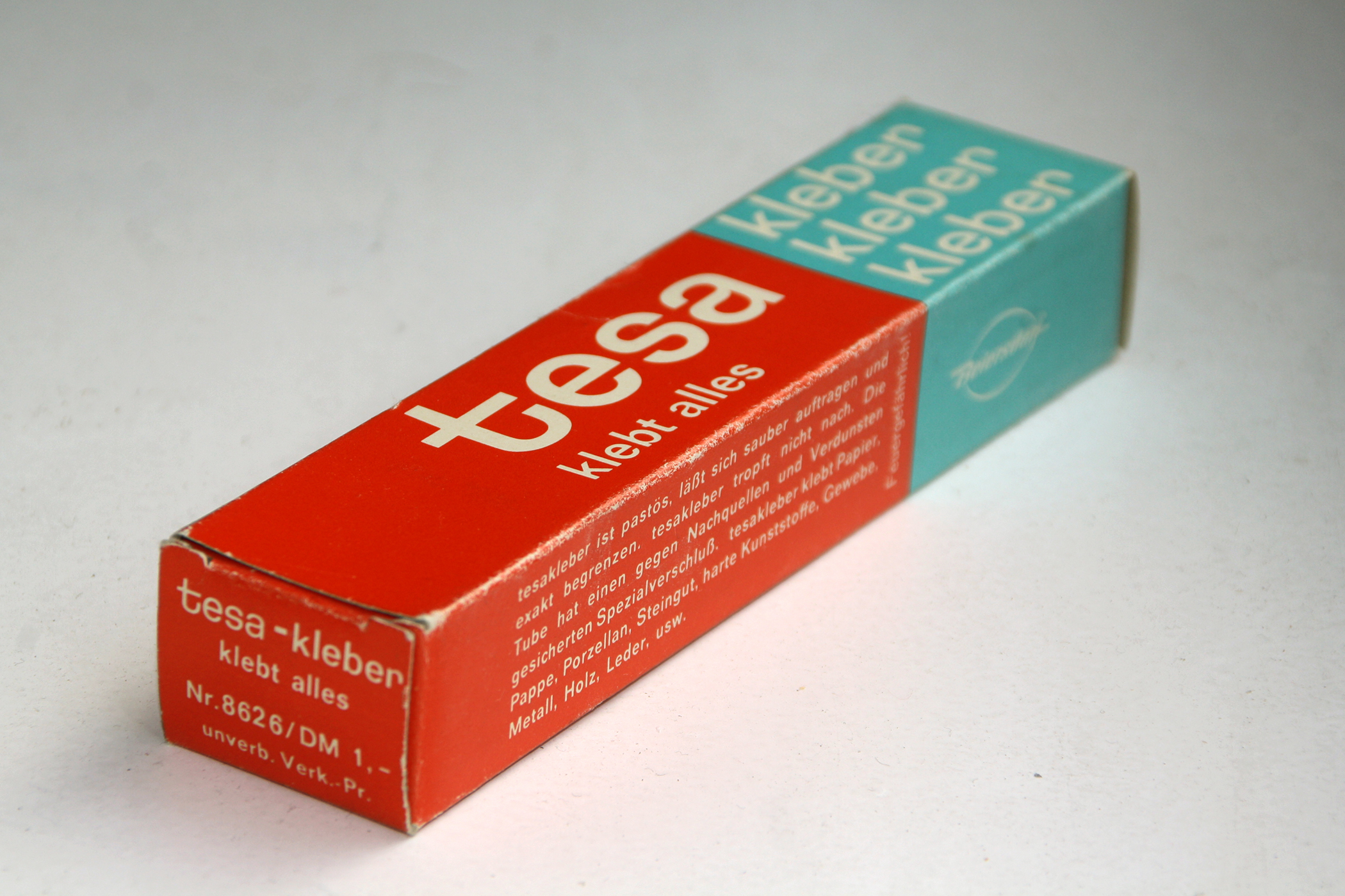 tesa kleber, Schachtel des flüssigen, pastösen Klebstoffes (vergleichbar einer anderen bekannten Marke) aus den 70er Jahren des 20. Jahrhunderts.